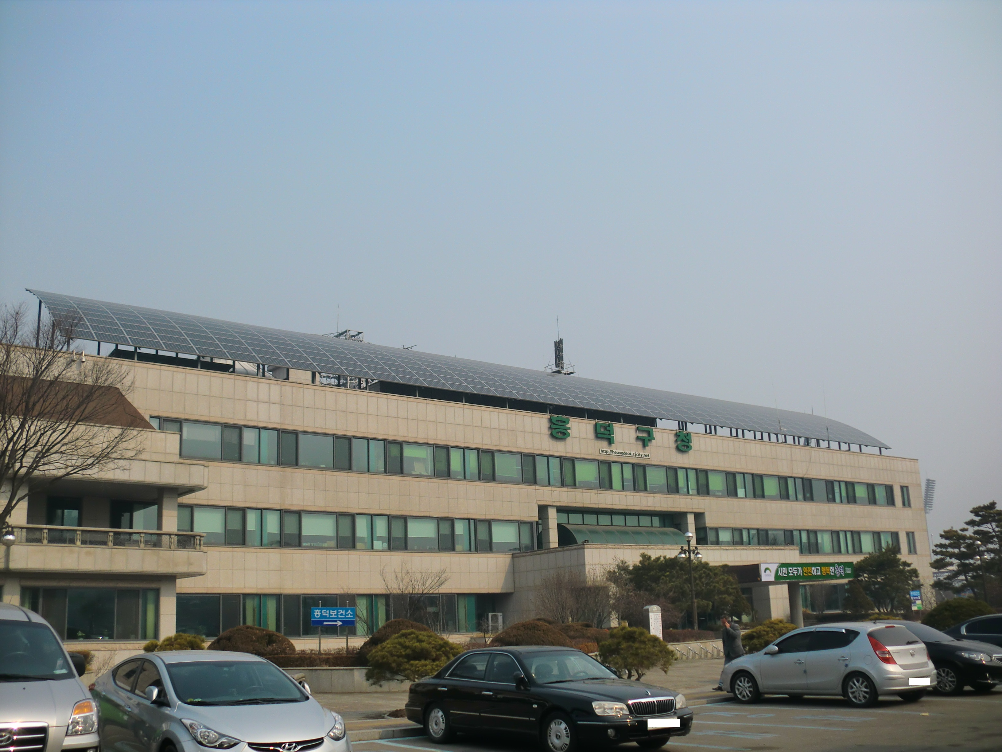 충청북도 청주시에 있는 흥덕구청